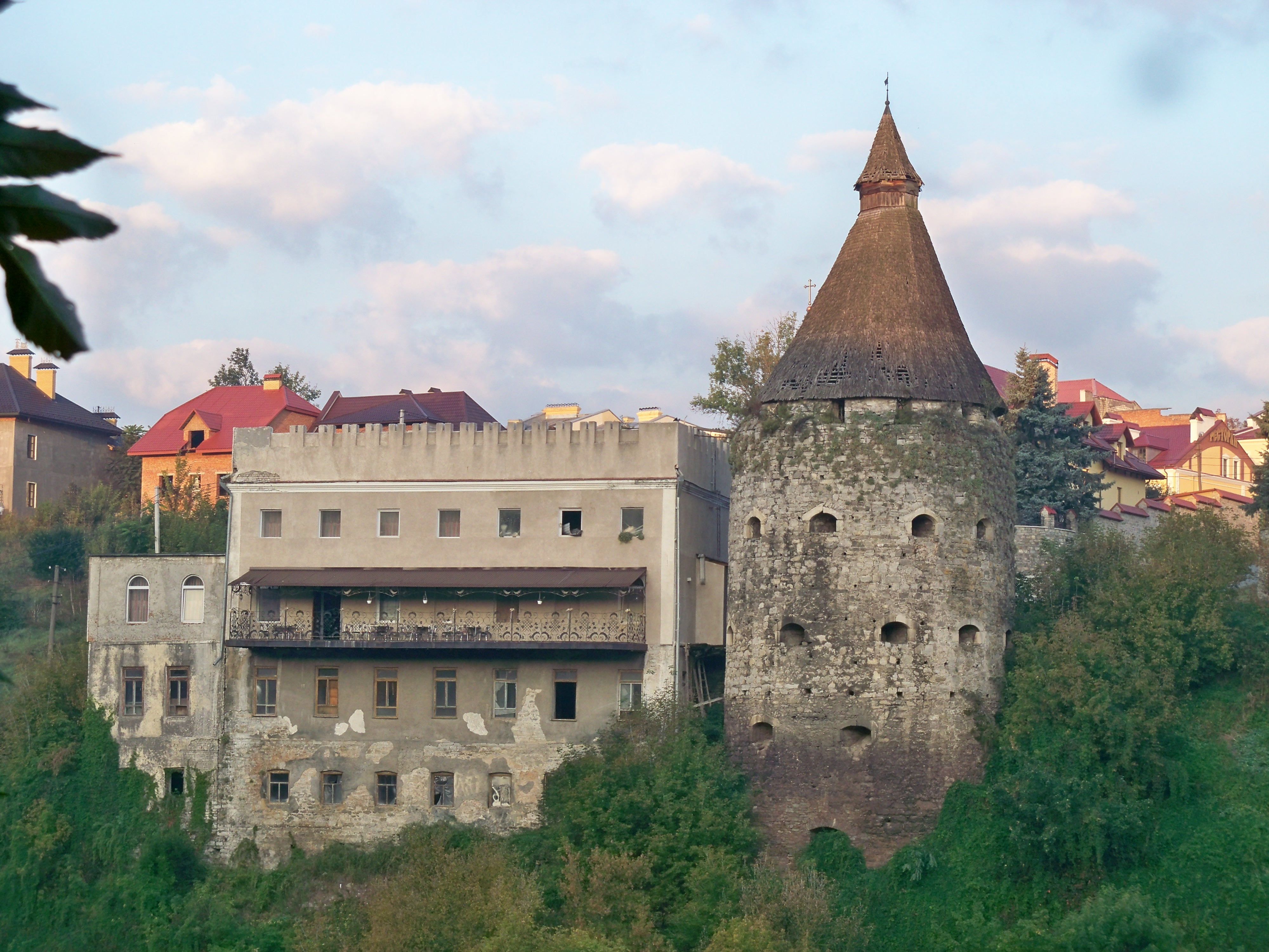 Гончарська башта, Кам'янець-Подільський, вул. Вали, 1а і колишня синагога